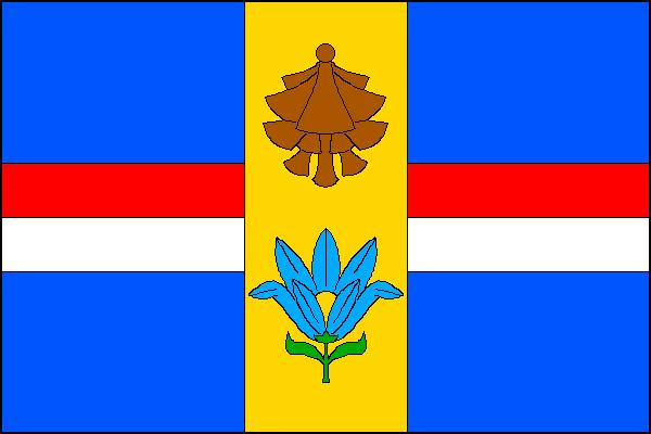 Vlajka obce Boreč